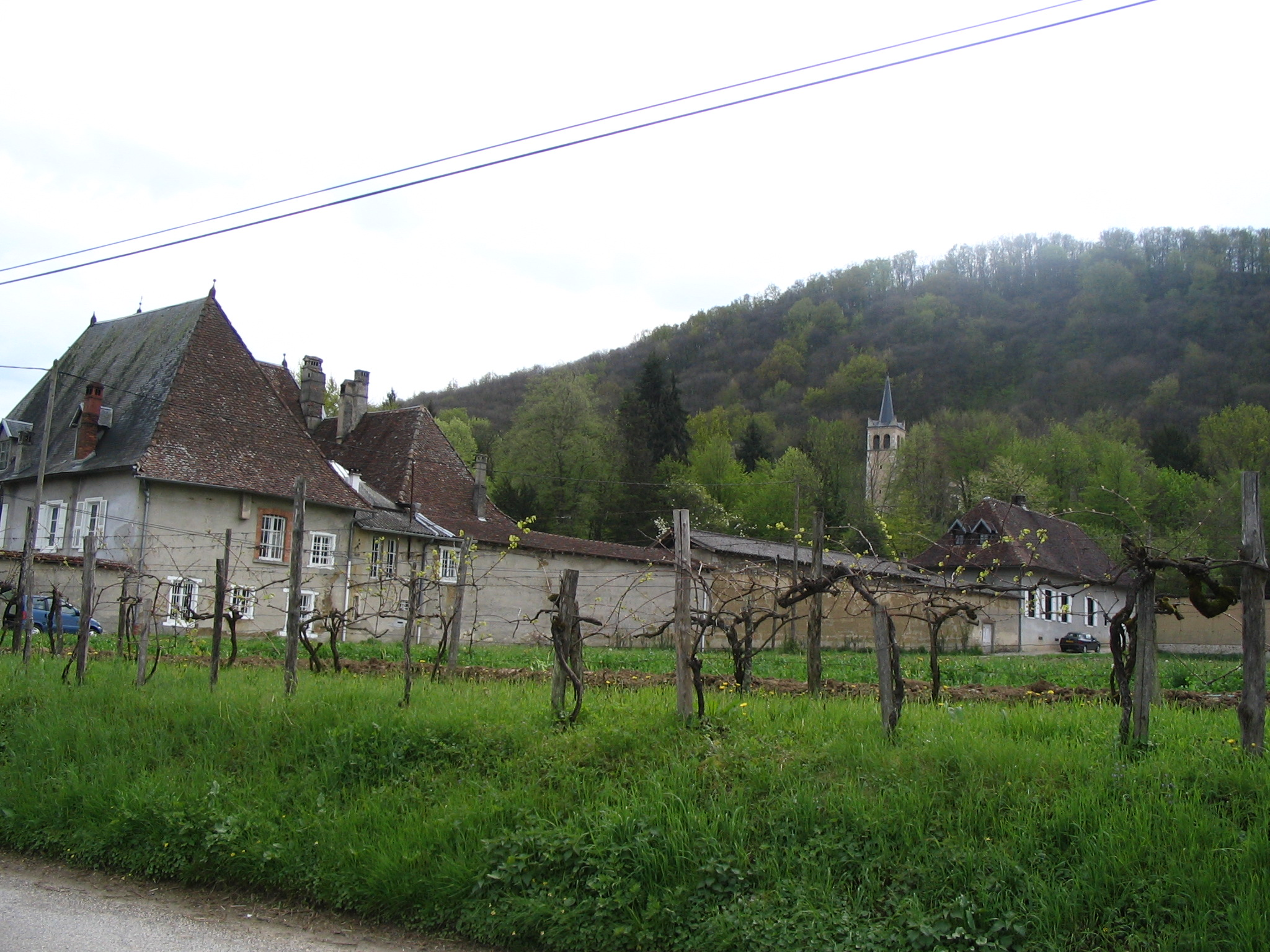 Pressins - Isère